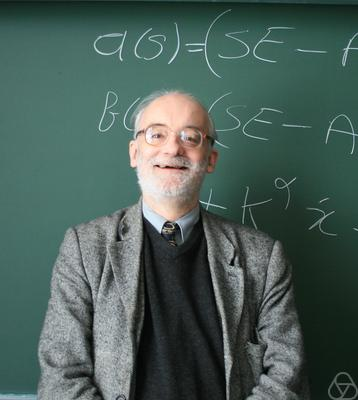 Foto di Jonathan Partington